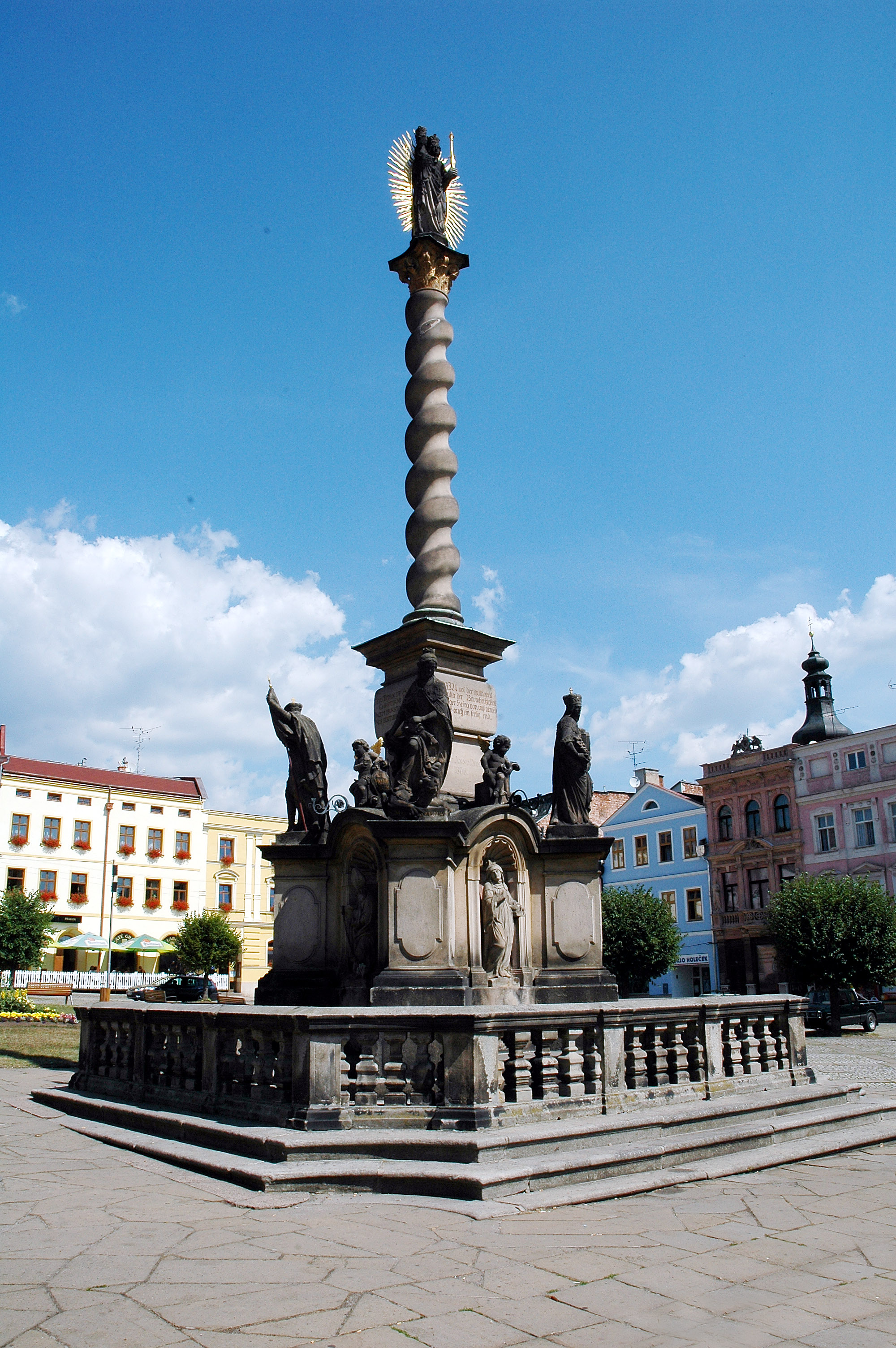 Mariánský sloup na náměstí v Broumově